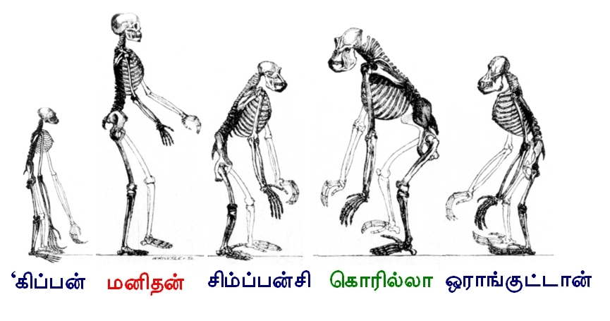 தமிழில் பெயர்கள்